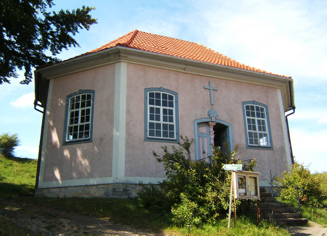 Achteckige Kirche in Geba